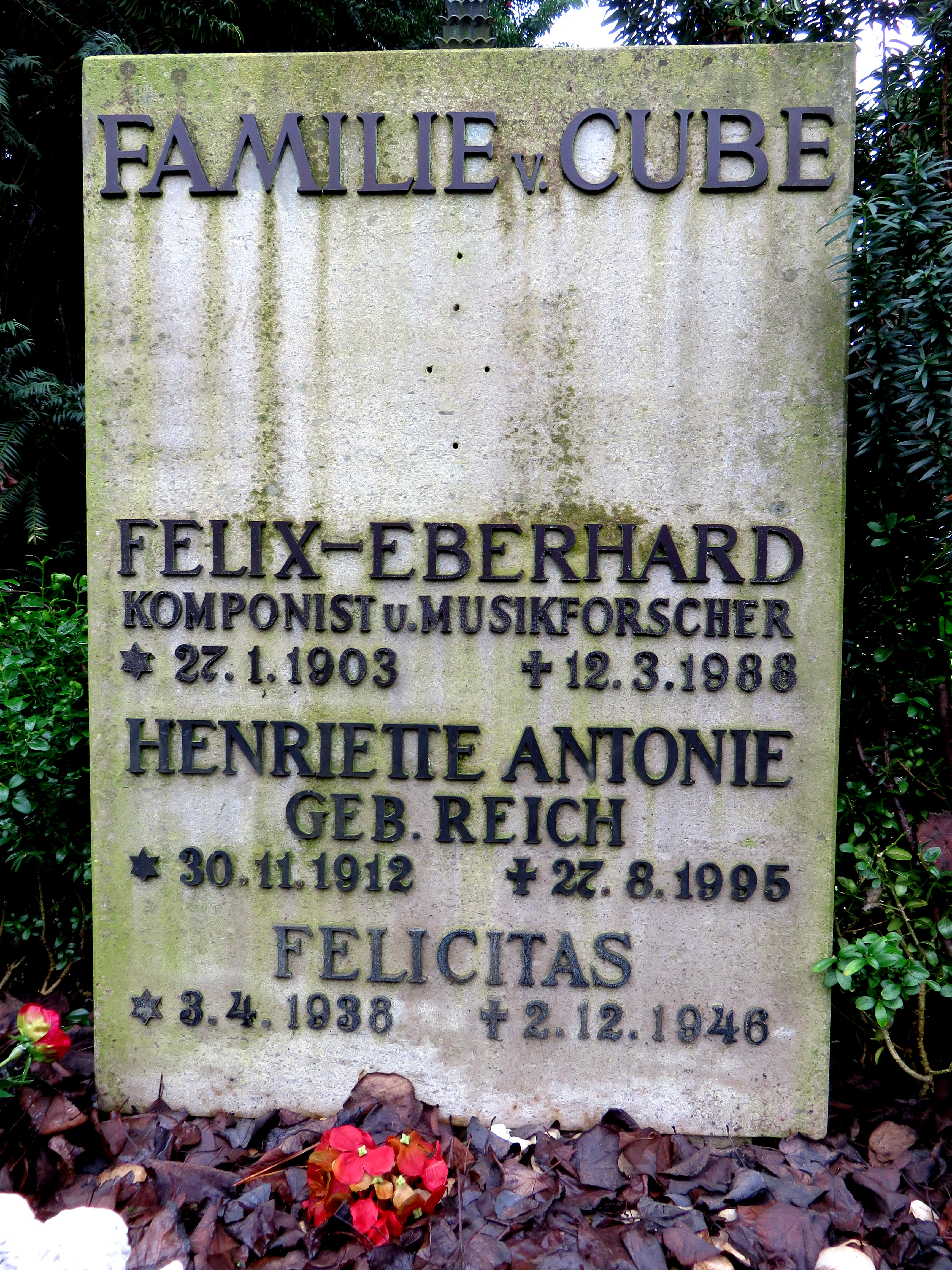 Grab des deutschen Komponisten und Musikforschers Felix-Eberhard von Cube, Friedhof Ohlsdorf, Planquadrat S 16 (südlich Kapelle 2).